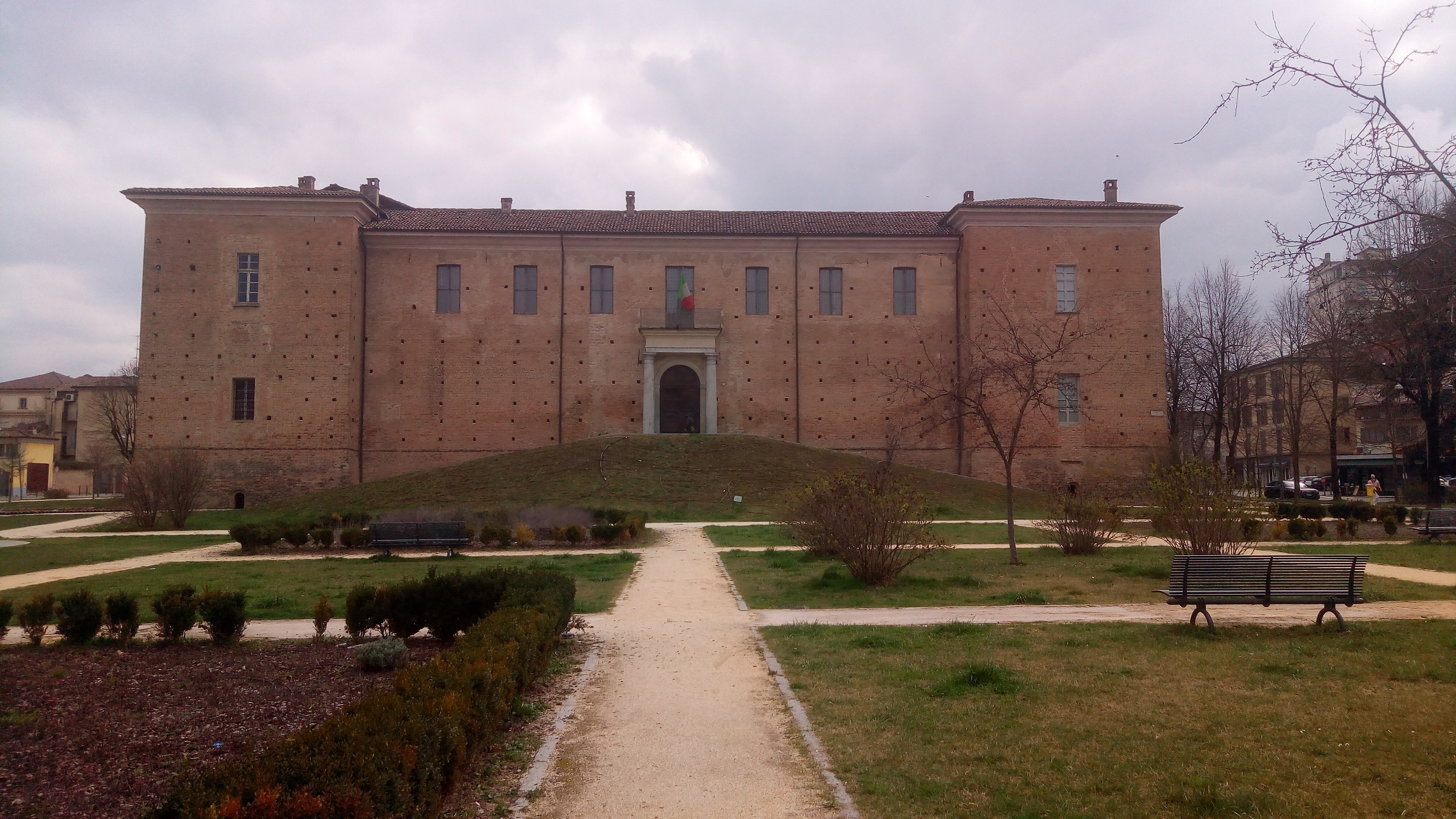 vista posteriore del Castello Visconteo di Voghera